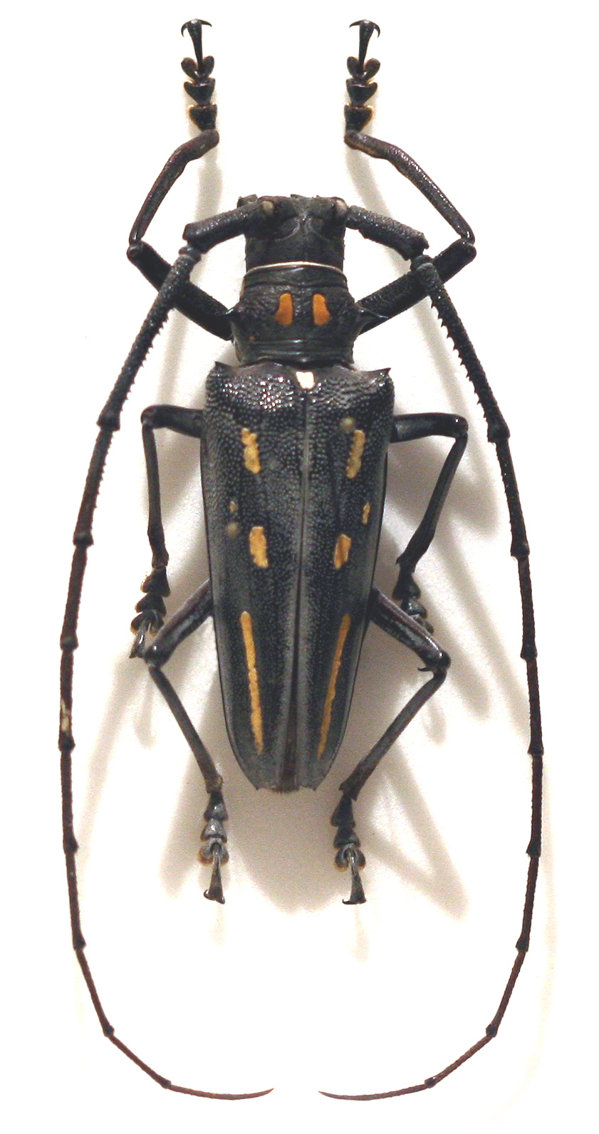 Batocera rosenbergi. Dead specimen